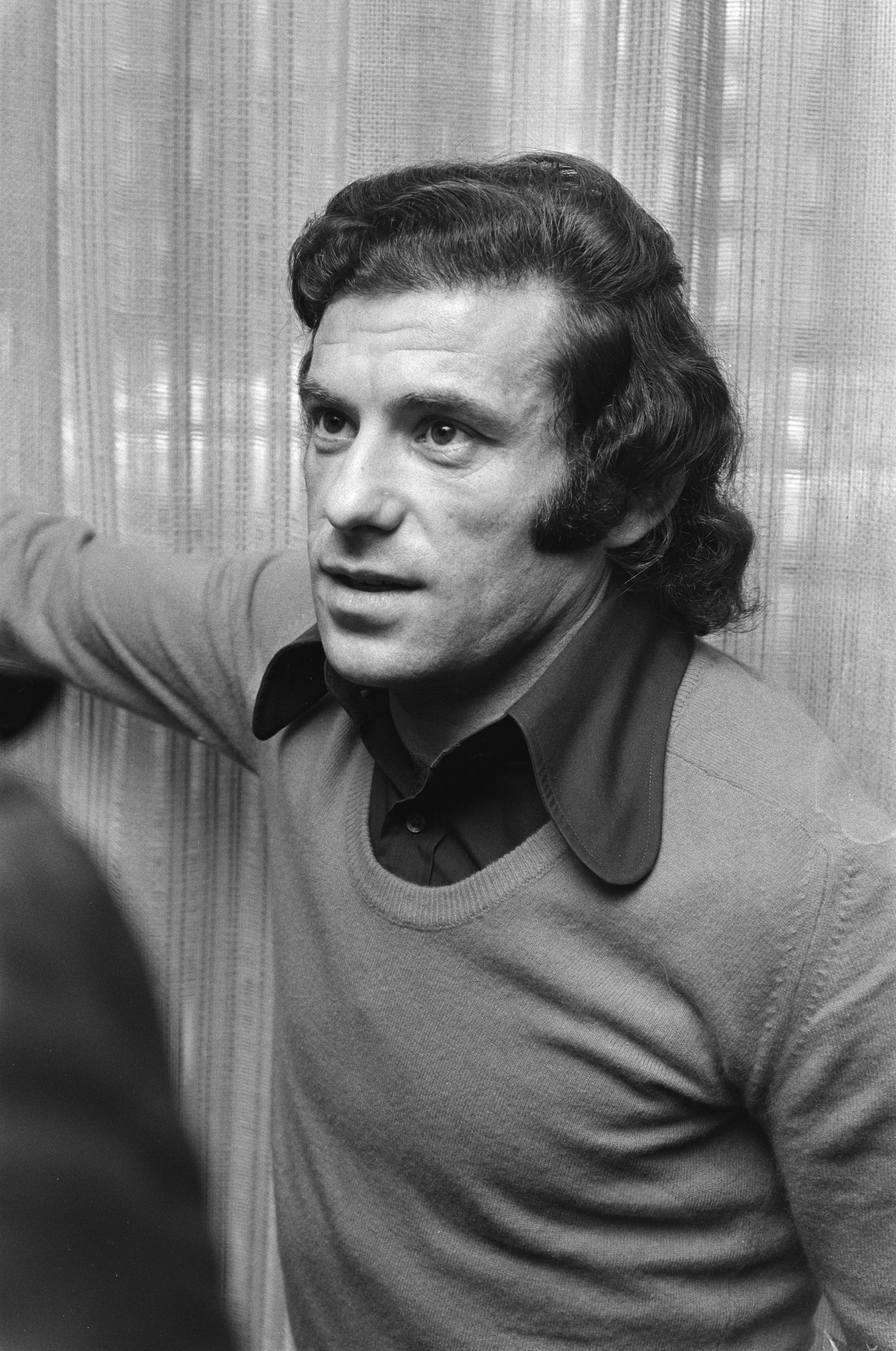 Collectie / Archief : Fotocollectie Anefo Reportage / Serie : [ onbekend ] Beschrijving : Training en persconferentie PSV en Benfica in Eindhoven; nr. 7 Simoes (Benfica) (kop) Datum : 4 maart 1975 Locatie : Eindhoven Trefwoorden : persconferenties Instellingsnaam : Benfica Fotograaf : Verhoeff, Bert / Anefo Auteursrechthebbende : Nationaal Archief Materiaalsoort : Negatief (zwart/wit) Nummer archiefinventaris : bekijk toegang 2.24.01.05 Bestanddeelnummer : 927-7898